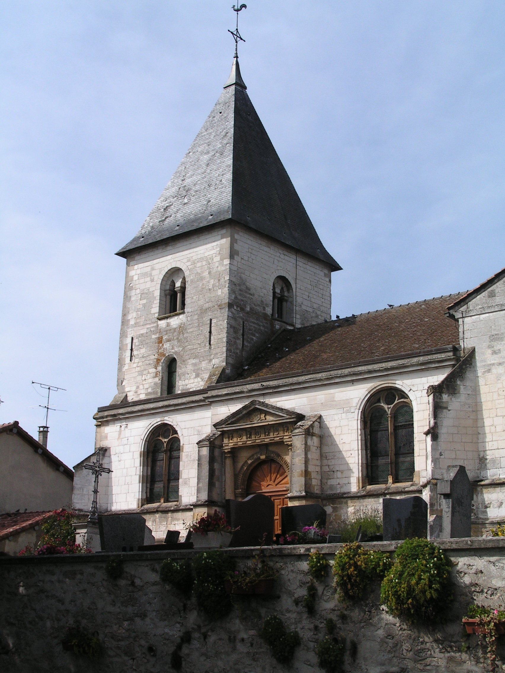 Église Saint-Nicolas de Marson (Classé) .